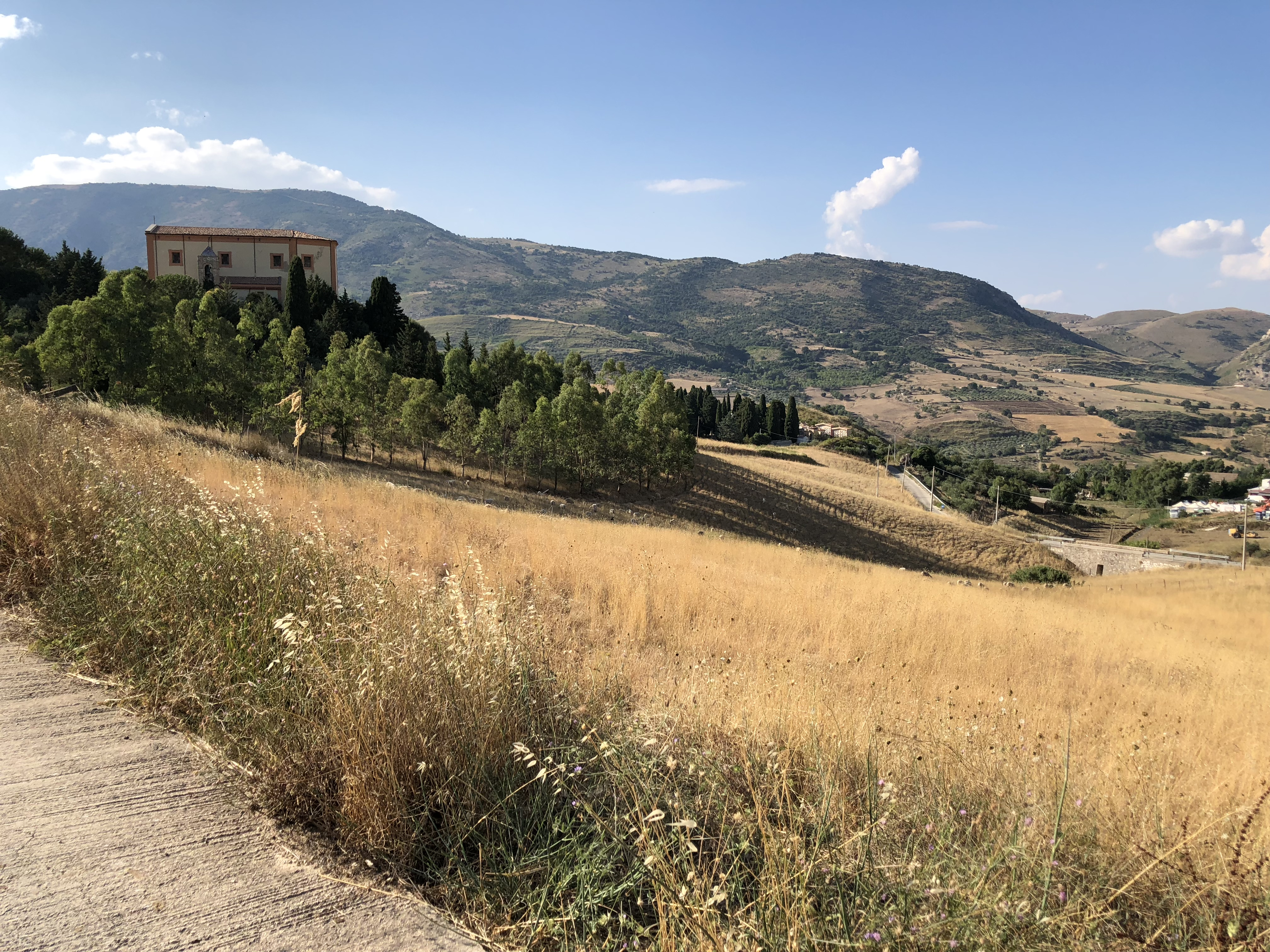 vista